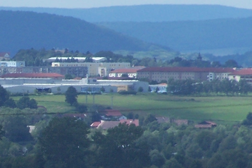 Blick vom Wanderweg Meimers-Barchfeld nach Ettmarshausen und Bad Salzungen. Die Häusergruppe von Ettmarshausen in der unteren Bildhälfte, darüber die Gebäude der Werratal-Kaserne und Plattenbauten von Bad Salzungen.